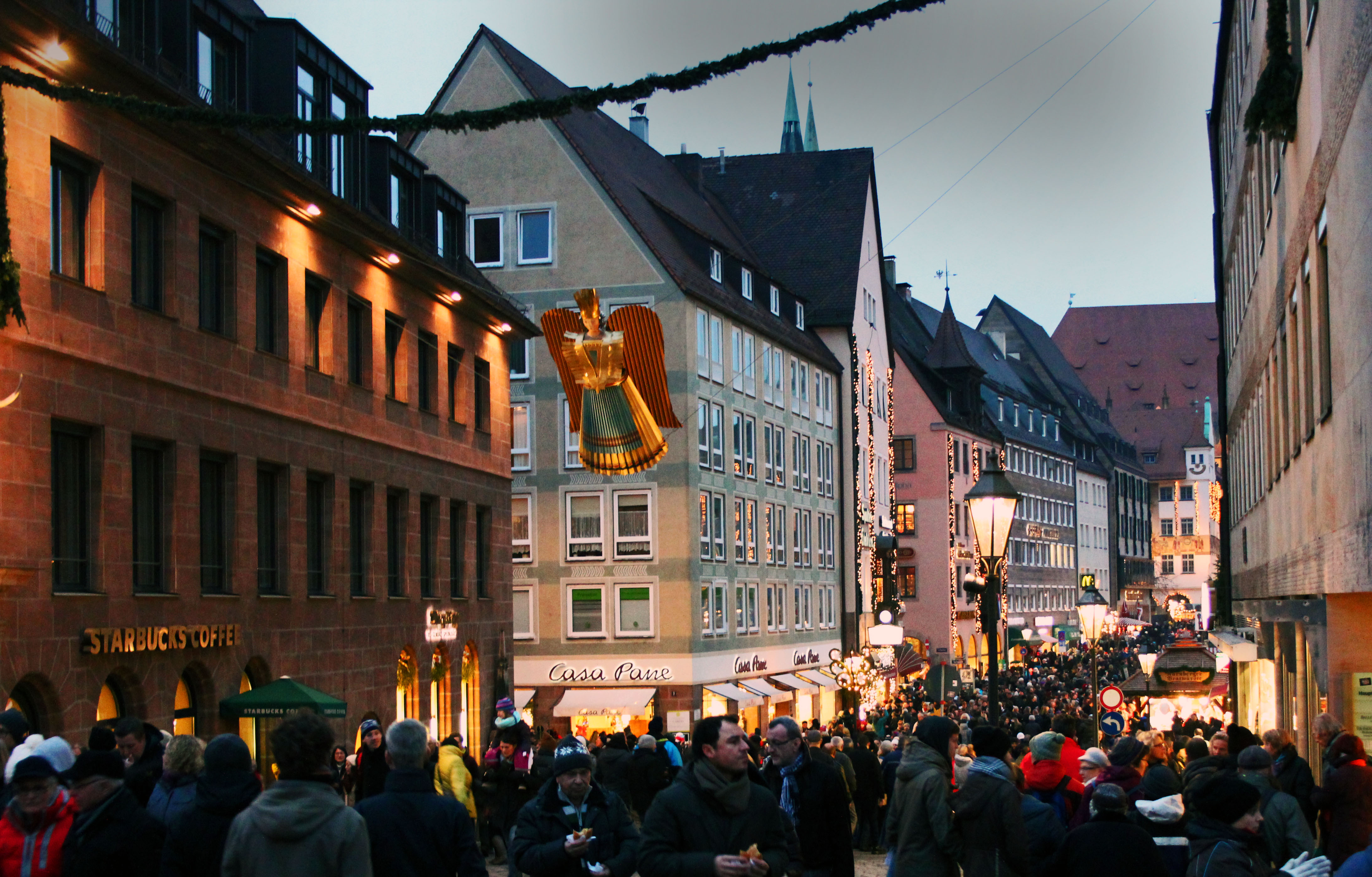 Fleischbrücke während des Christkindlesmarktes in Nürnberg